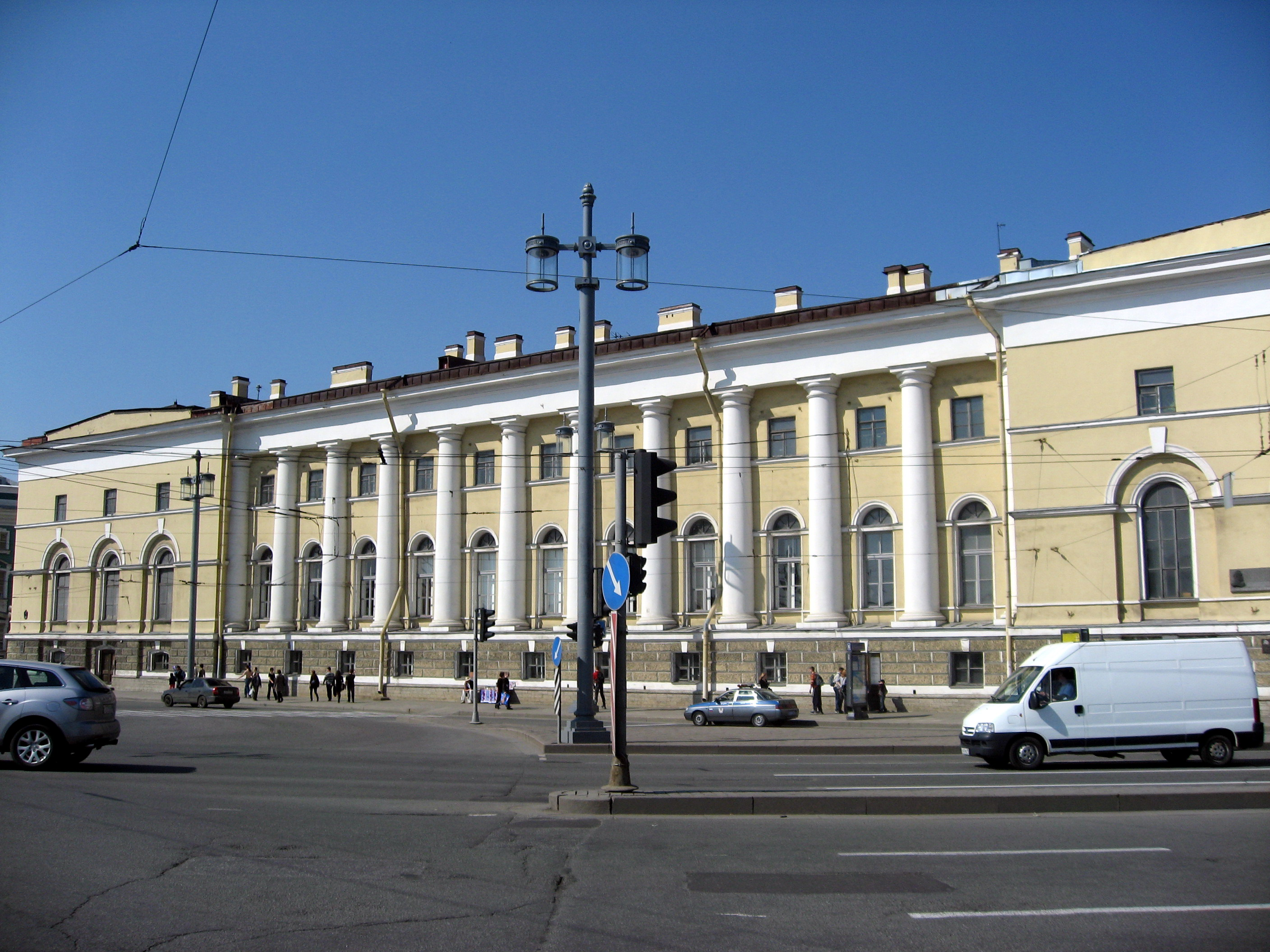 Sankt-Petěrburg (Petrohrad)